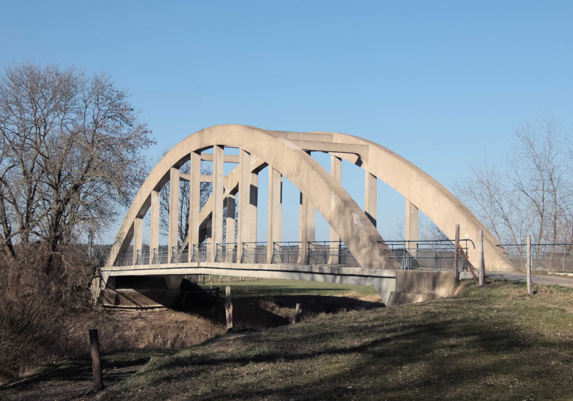 Ein Baudenkmal im Seelzer Stadtteil Lohnde. 1912 aus Stahlbeton gebaute Dreigelenkbrücke über die Leine.